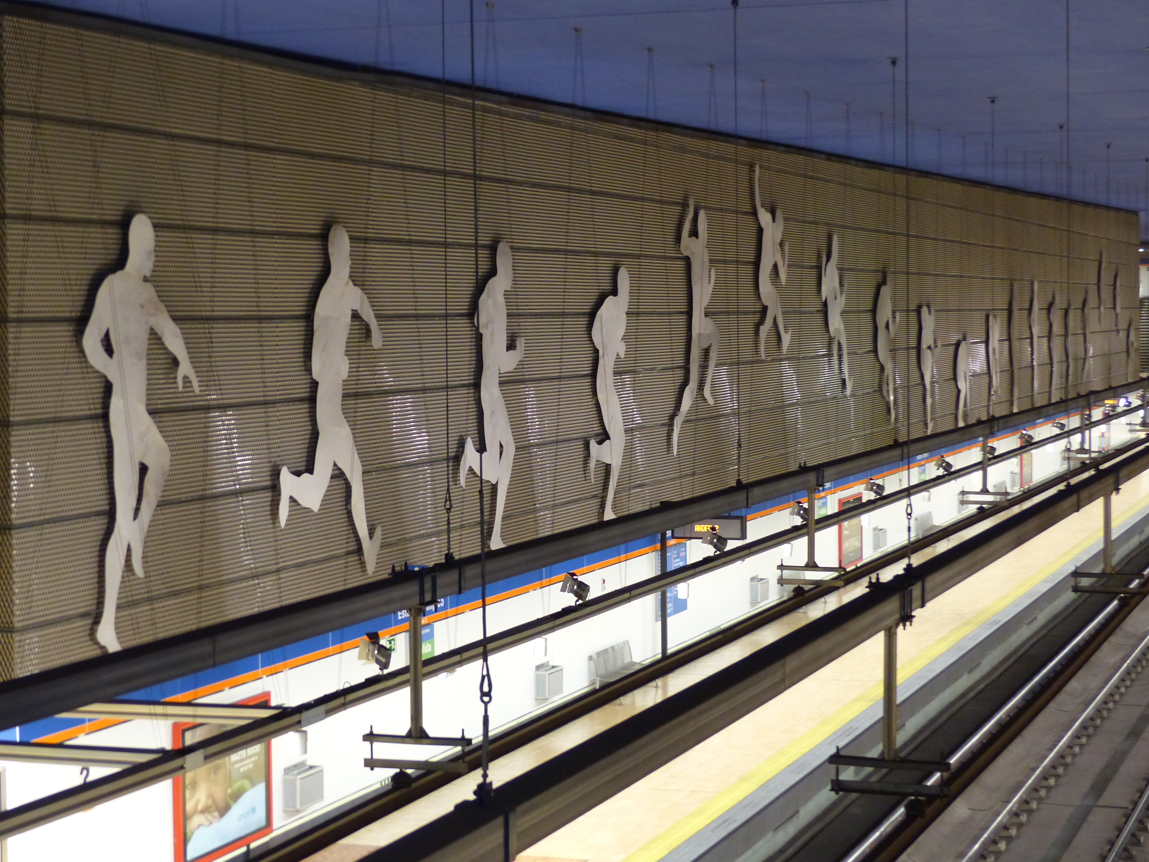 Atleta, andén dirección Las Musas, Estación Estadio Olímpico, Línea 7.